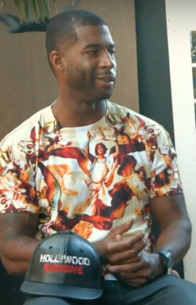 American actor Robert Christopher Riley.